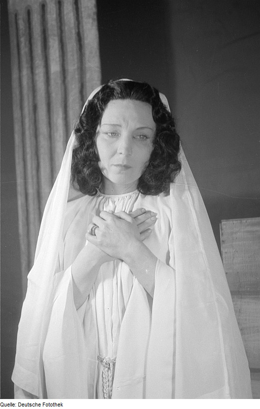 Original image description from the Deutsche Fotothek In der Hauptrolle Hilde Körber als Sappho